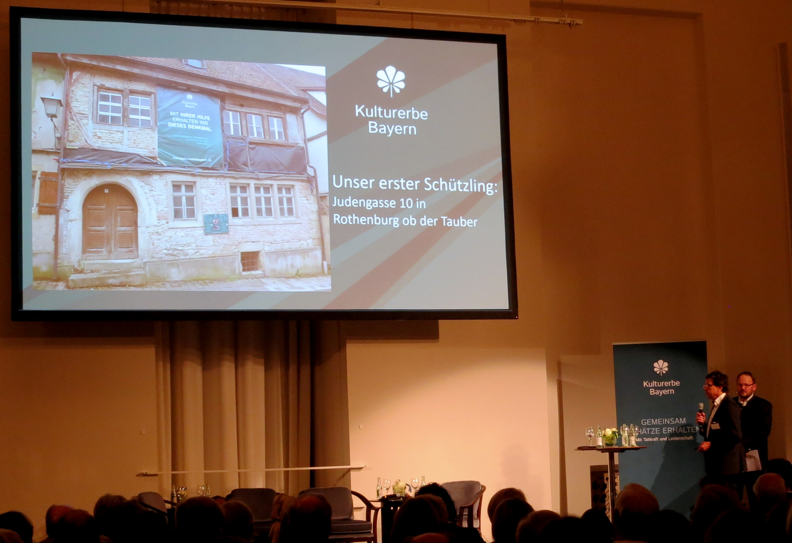 Eröffnungsveranstaltung im Bayerischen Landtag